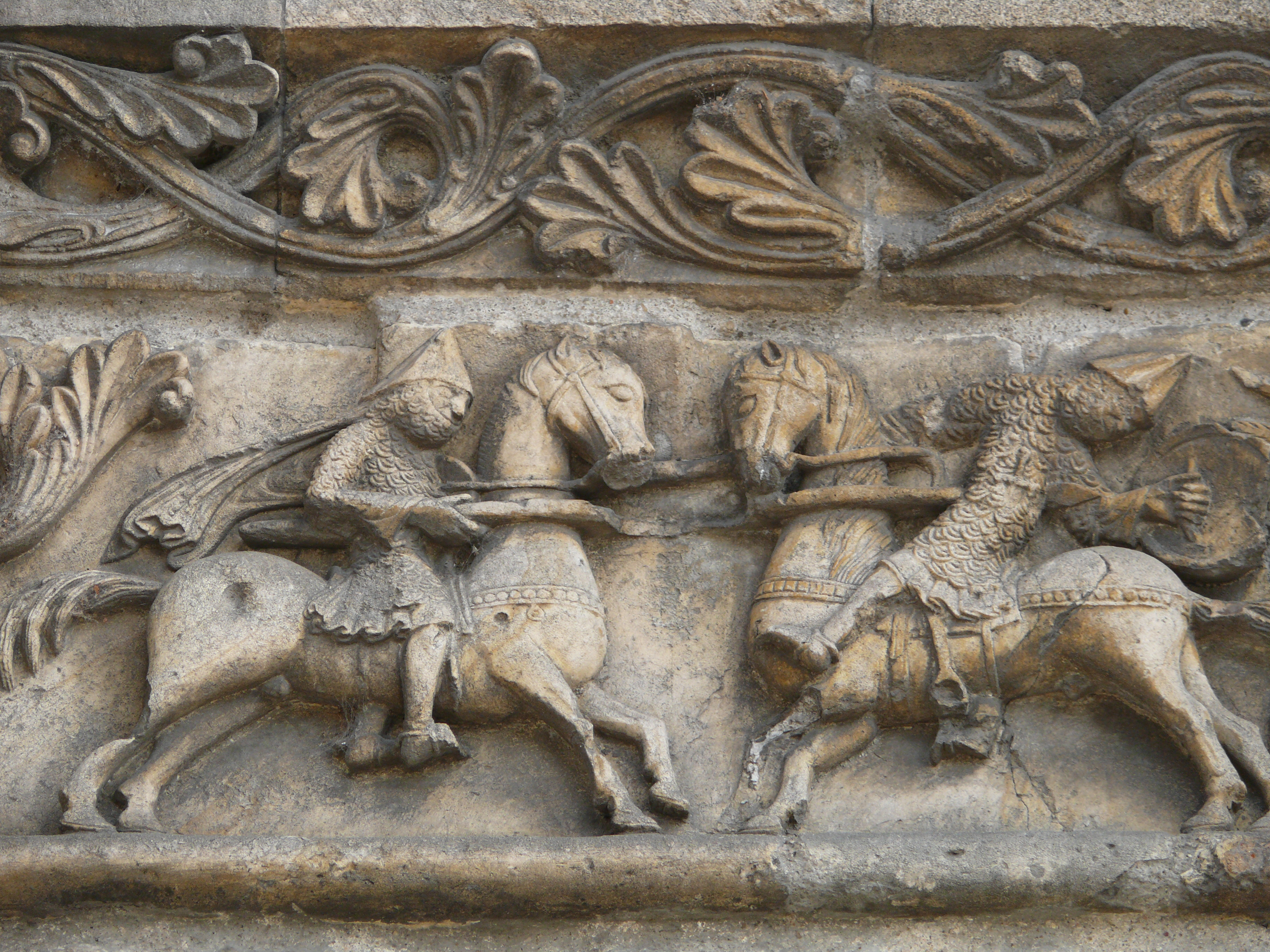 Angoulême - Cathédrale Saint-Pierre - Façade - Chanson de Roland (détail 2)